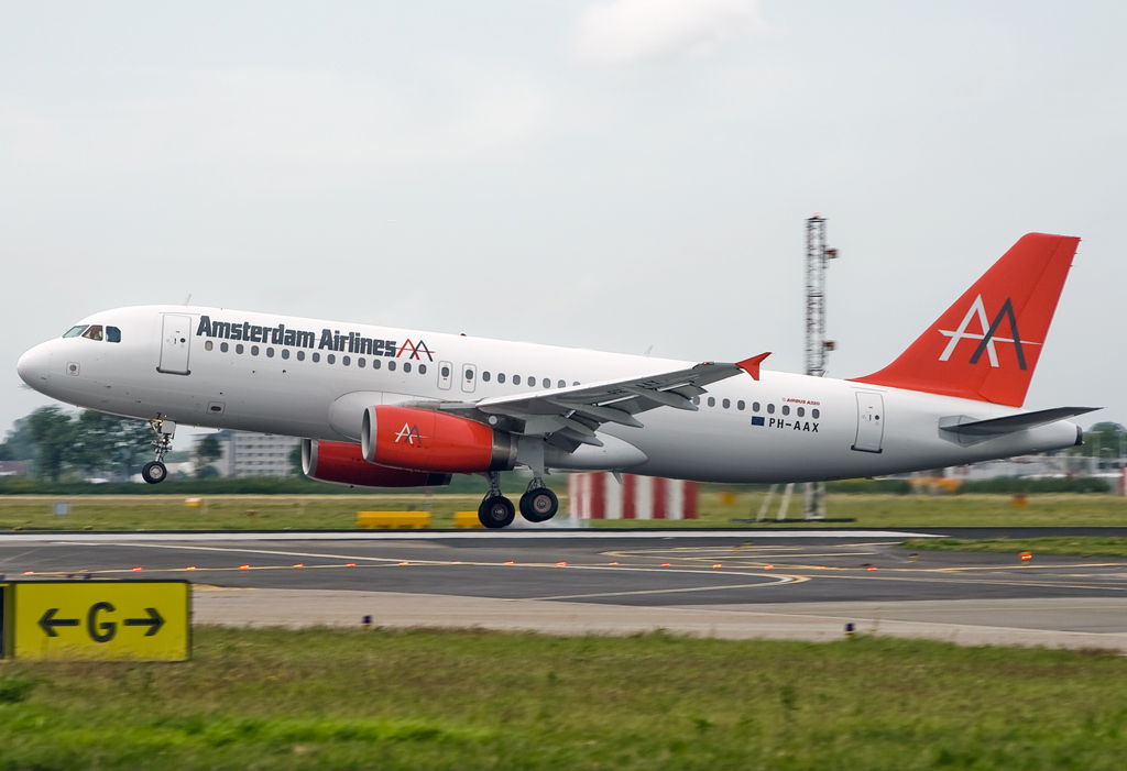 Airbus A320 Amsterdam Airlines land op Schiphol